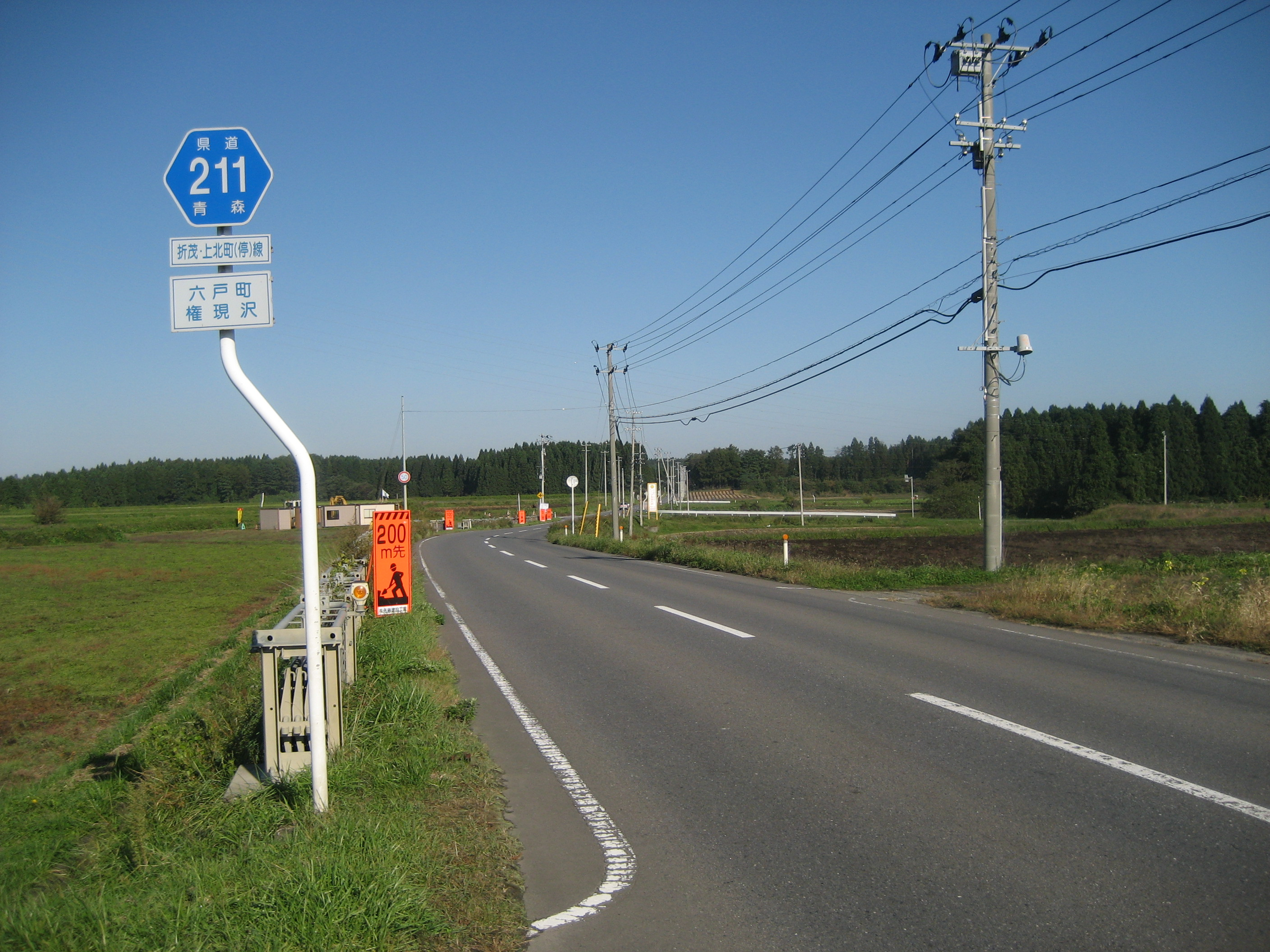 青森県道211号線六戸町権現沢付近